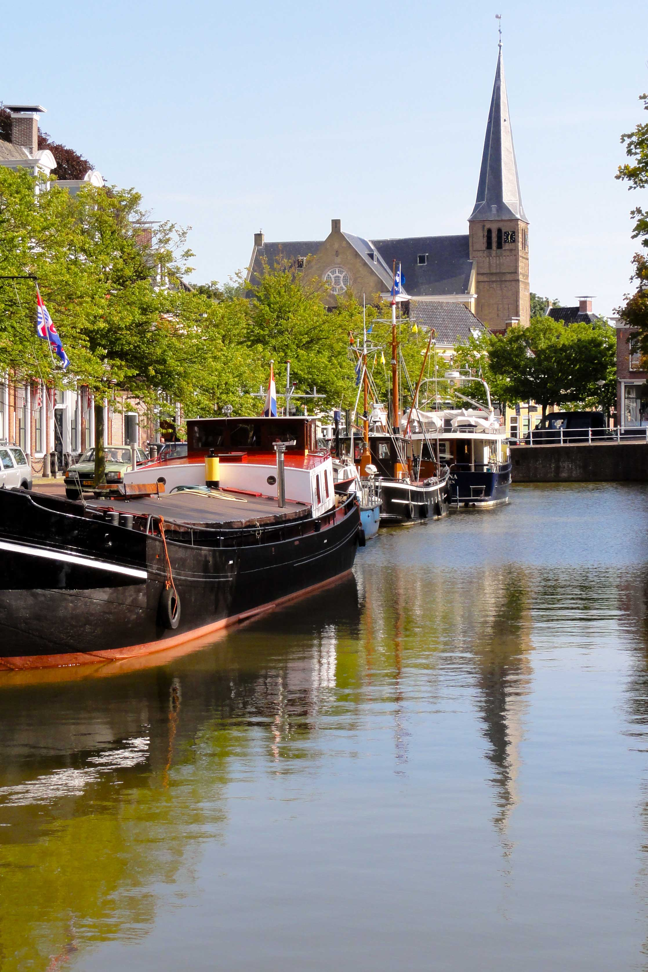 Grote of Nieuwe Kerk in Harlingen